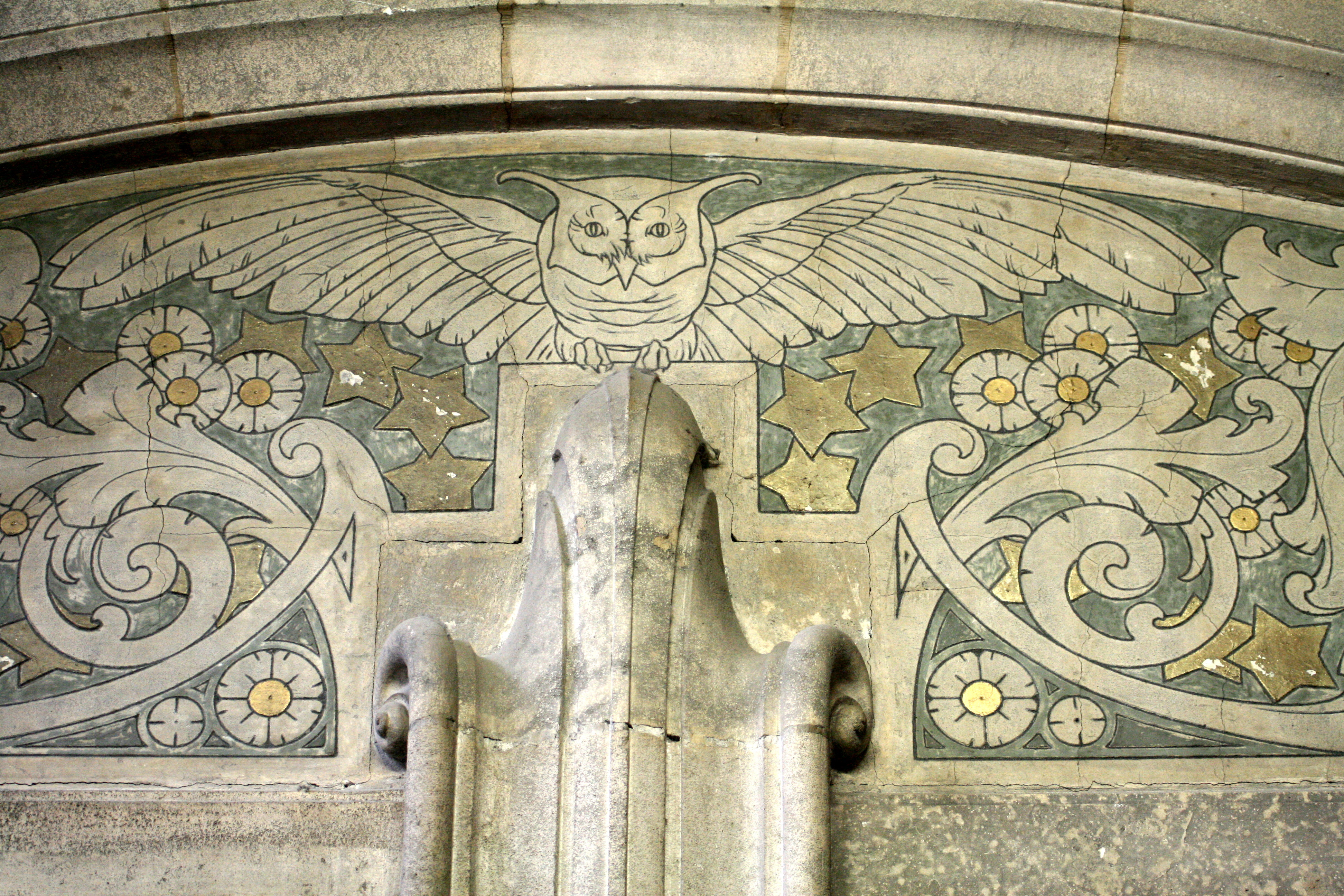 Institut Diderot, rue des Capucins 58, Bruxelles (Belgique). Ancienne école normale Emile André (1902). Architecte: Henri Jacobs. Hall d'entrée: détail d'un sgraffite de Privat Livemont.